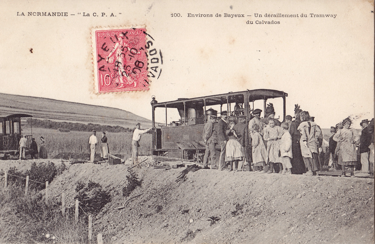 Carte postale ancienne éditée par "La CPA", collection La Normandie, n°100 :Environs de Bayeux - Un déraillement du Tramway du Calvados